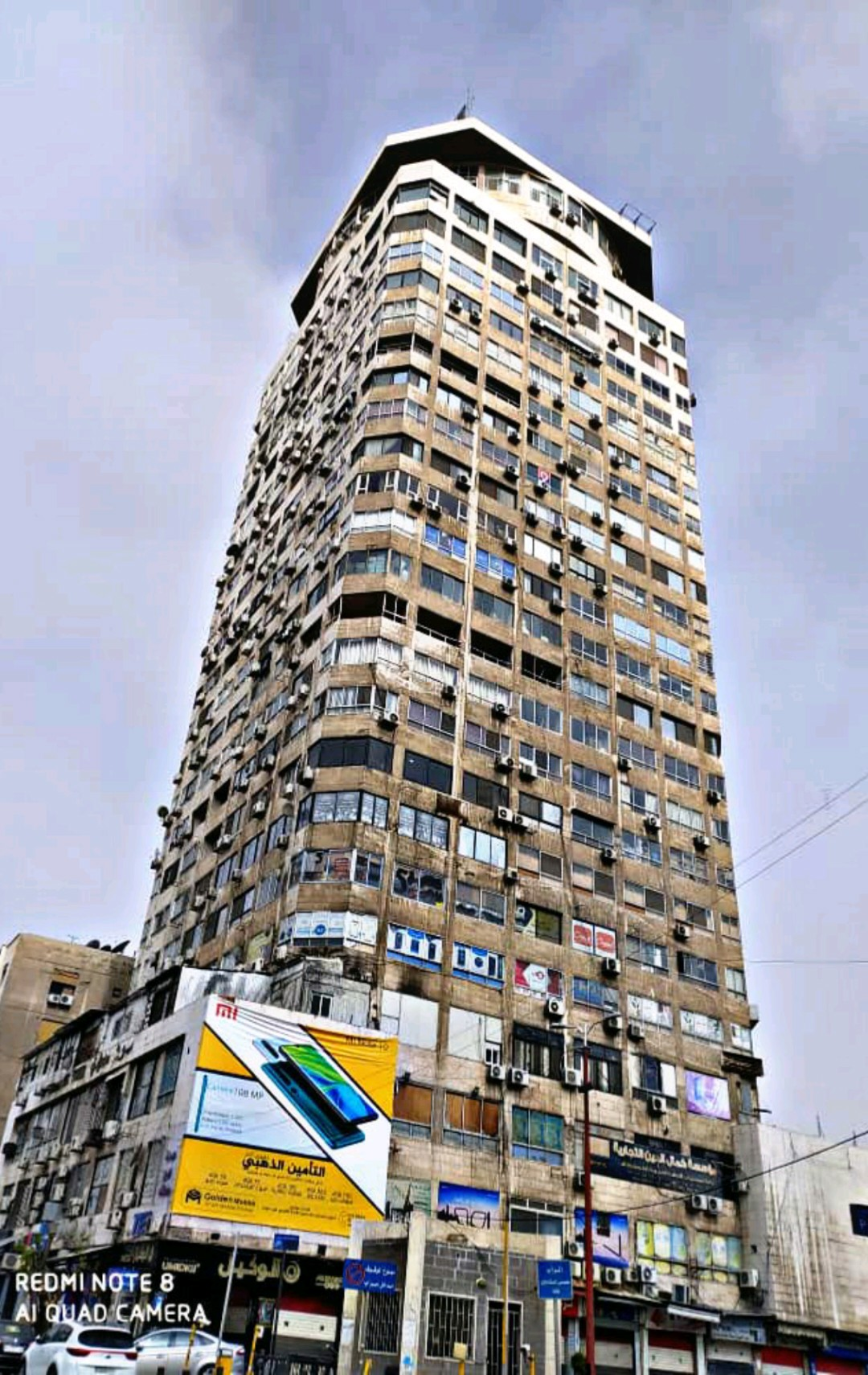 برج دمشق عام 2019م